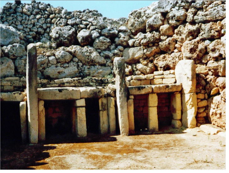 Tempelanlaag ut de Steentiet up de maltesische Insel Gozo